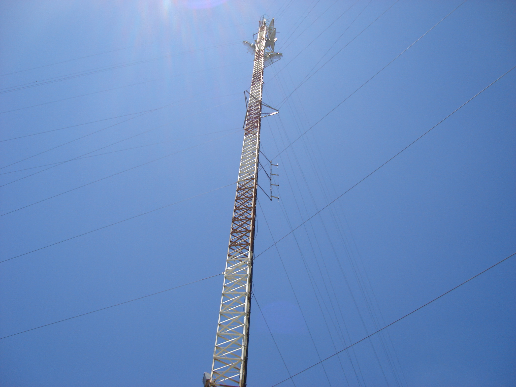 Torre de transmissão da RBS TV de Santa Rosa, RS.